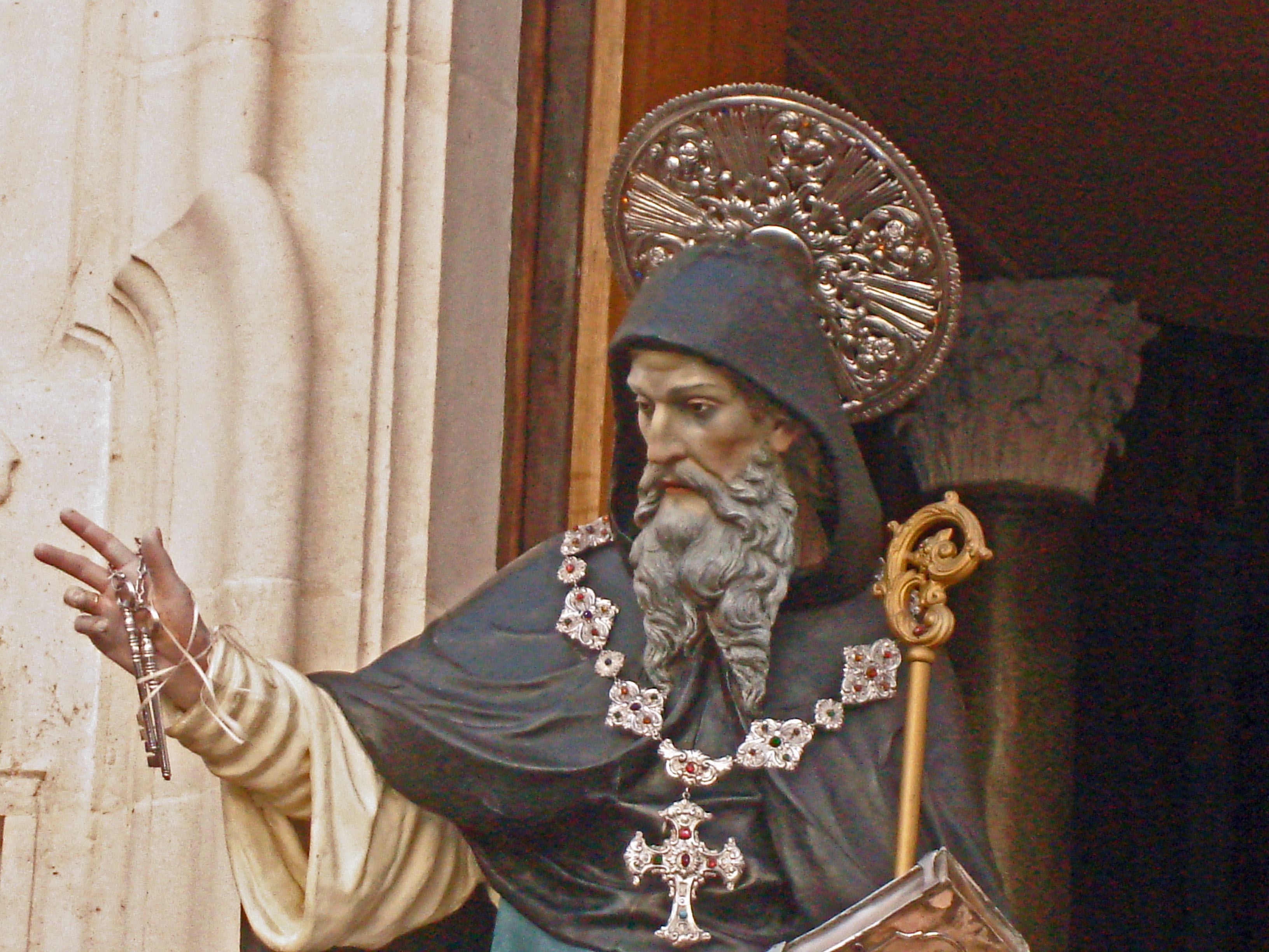 Statua S. Barsanofio, foto personale Dazimos, Oria, Agosto 2006.